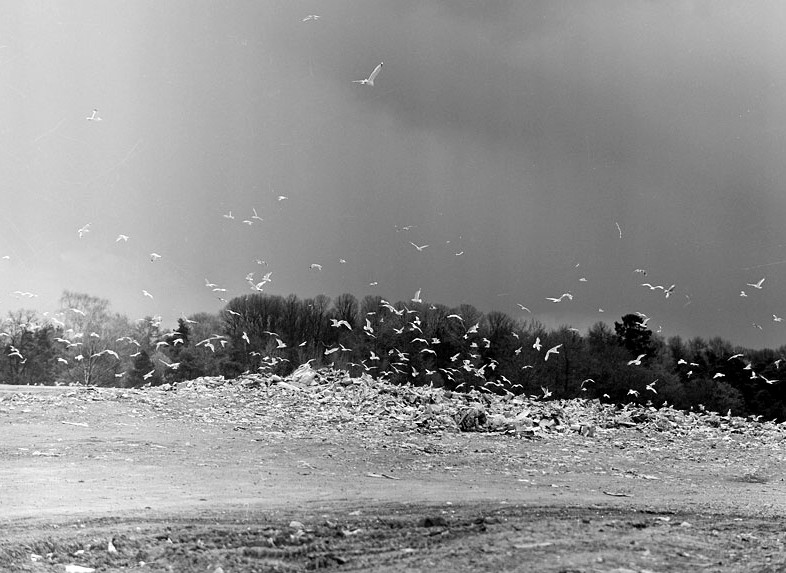 Lövsta soptip 1962